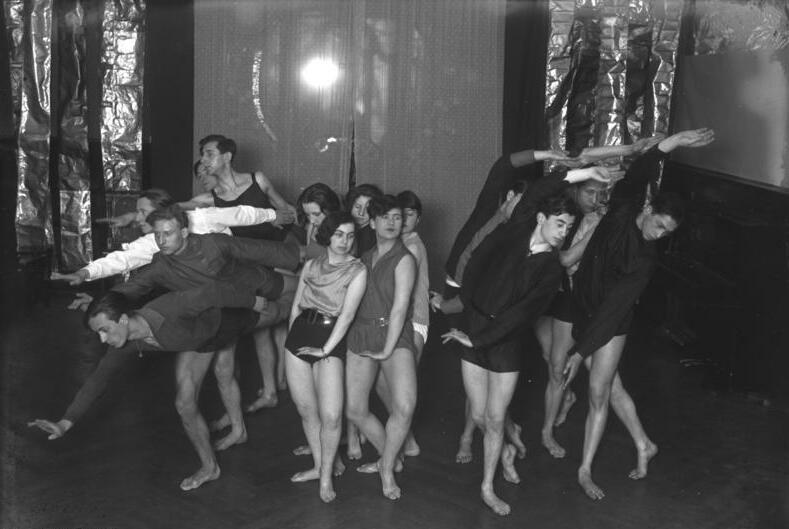 Aus dem Choreographischen Institut Laban in Berlin-Grunewald! Junge Mädchen und Männer des Tanz-Institutes Laban bei Ausübung eines rythmischen Tanzes.